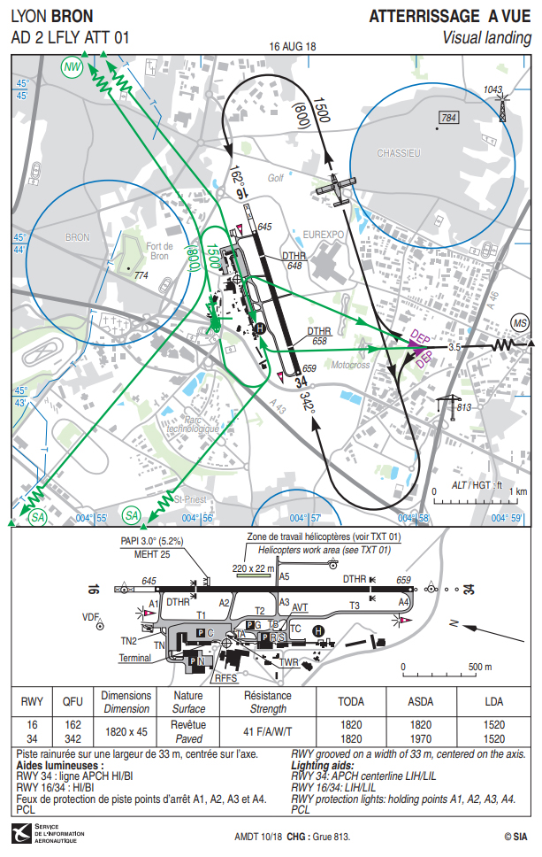 Carte d'approche à vue de l'aéroport de Lyon Bron - LFLY. 2e page du document représentant le circuit de l'aéroport, l'environnement proche de l'aéroport ainsi que la piste et les installations.